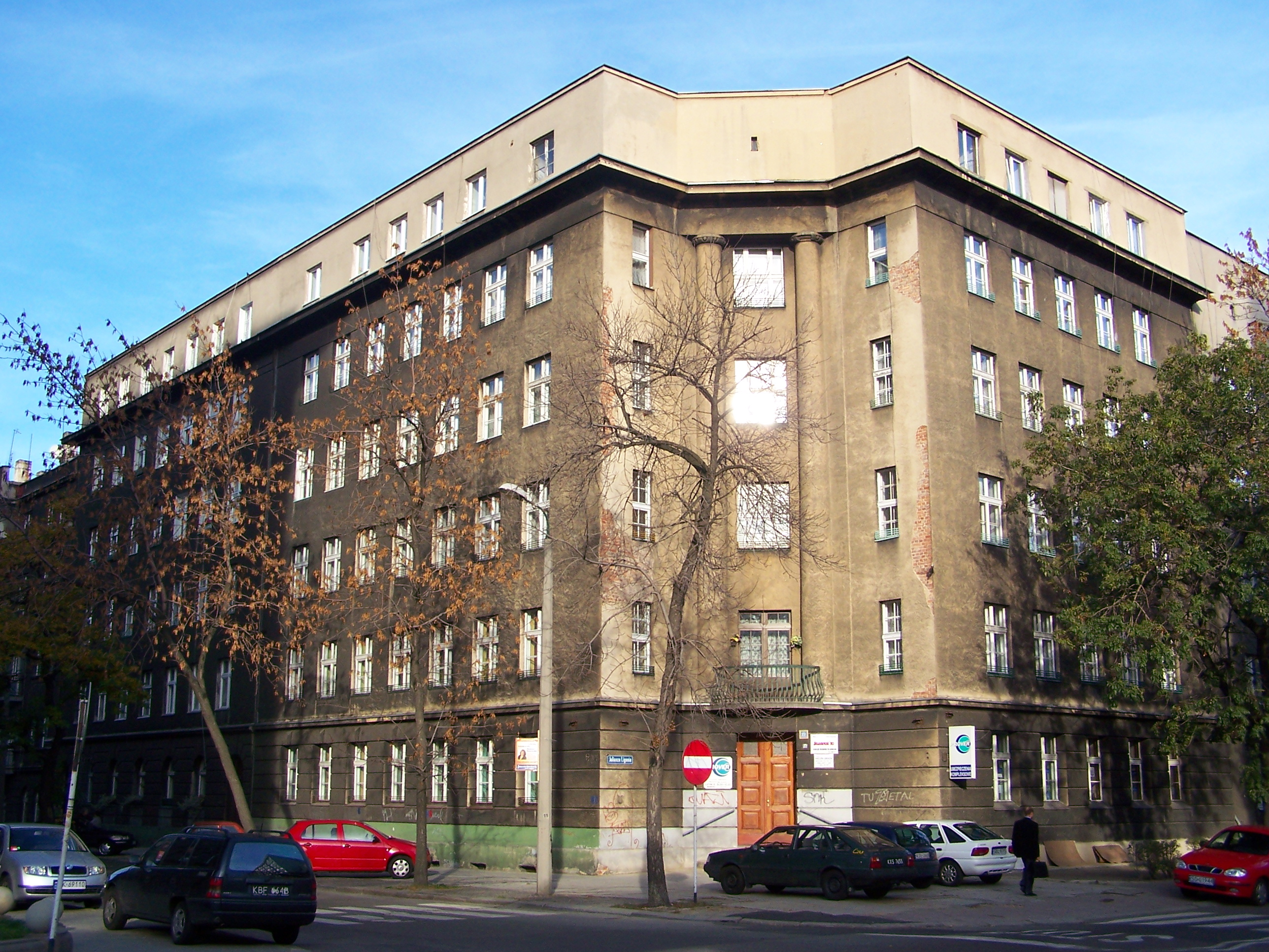 Budynek przy ul. Ligonia 22 w Katowicach. Obecnie siedziba "Solidarności" w Katowicach.